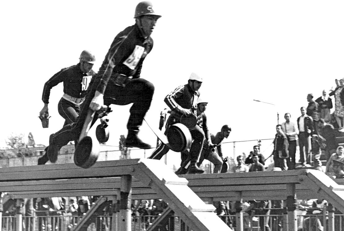 Спортсмен преодолевает 100-метровую полосу с препятствиями в форме согласно правил после 1970 г.